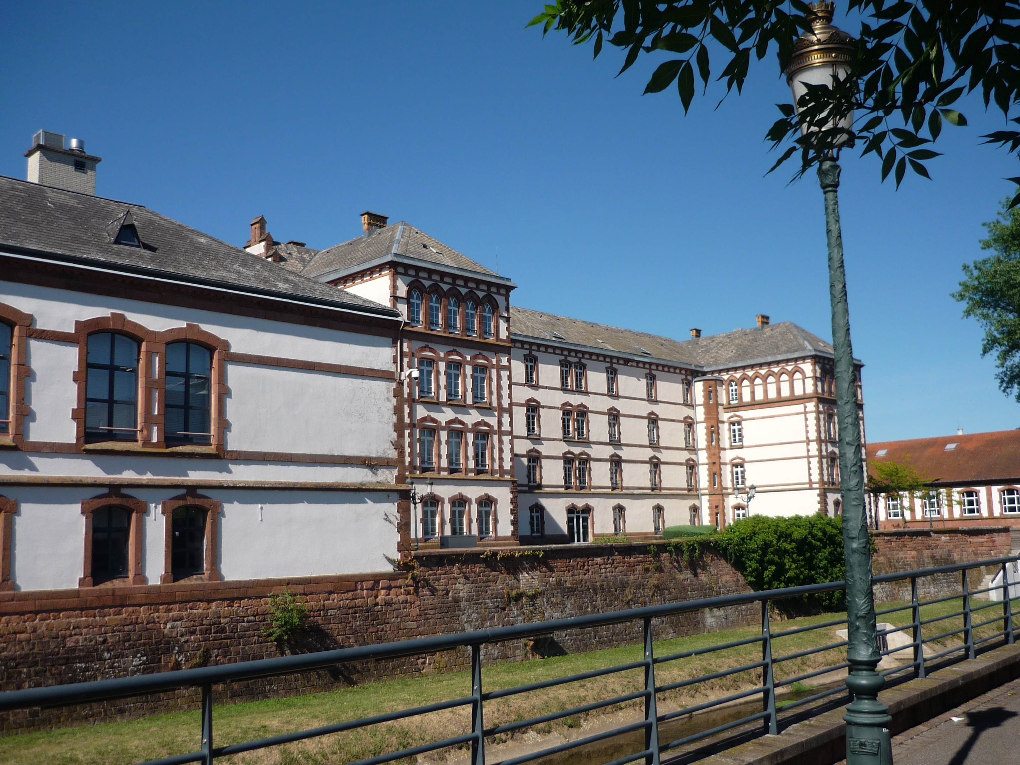 Lycée professionnel Siegfried et école de musique (ancienne caserne) de Haguenau vu du Quai des Pêcheurs